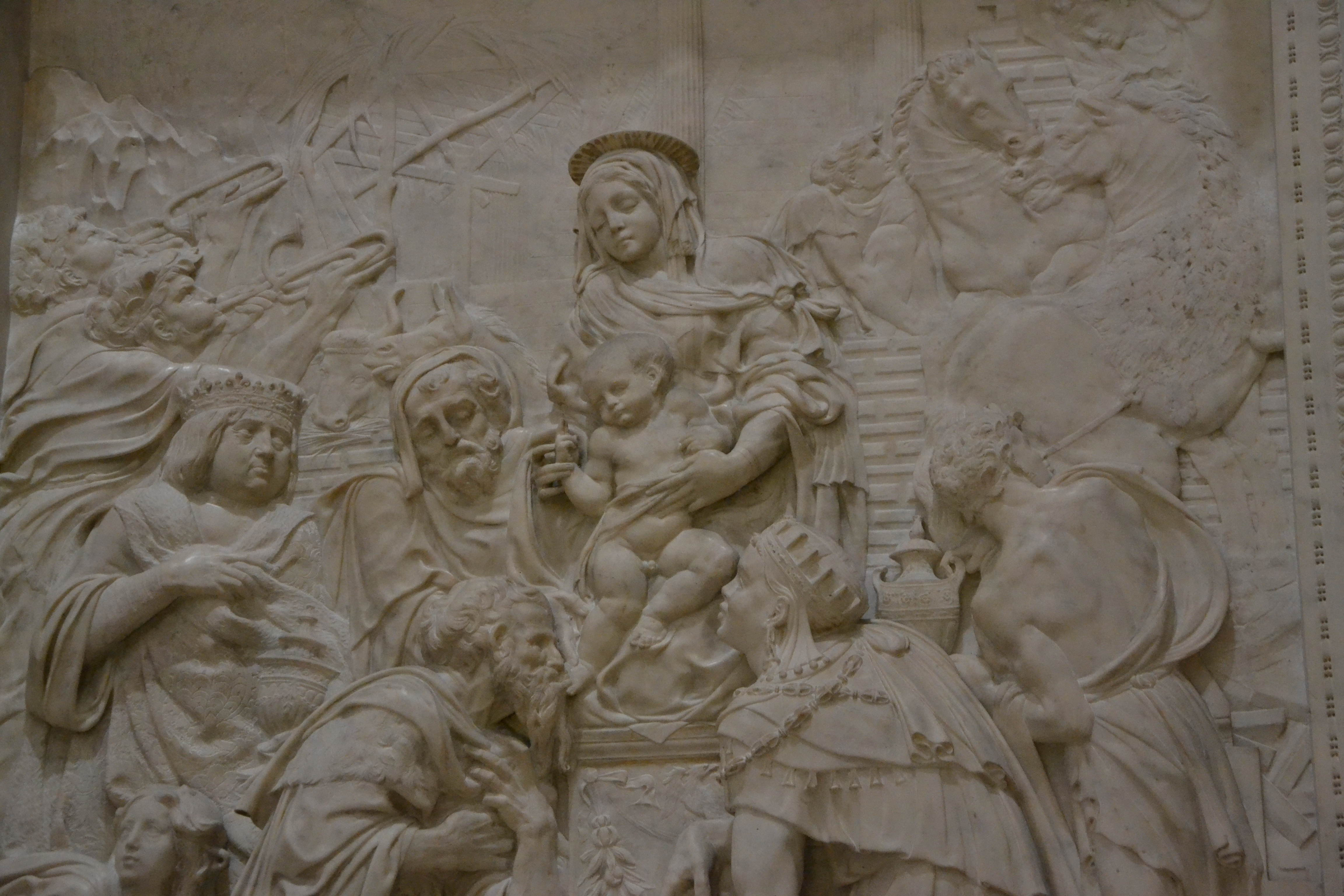 'altare marmoreo dell'Epifania degli scultori spagnoli Diego De Siloé e Bartolomé Ordoñez del 1516 circa, Napoli, chiesa di San Giovanni a Carbonara - Cappella Caracciolo di Vico